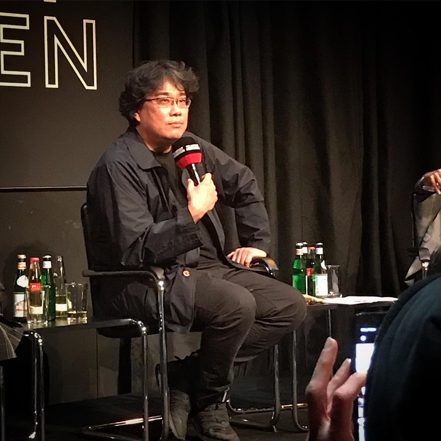 Пон Чжун Хо, южнокорейский режиссёр на мюнхенском международном кинофестивале 4 июля 2019 года в Black Box культурного центра Гастайг, Мюнхен, Бавария, Германия.